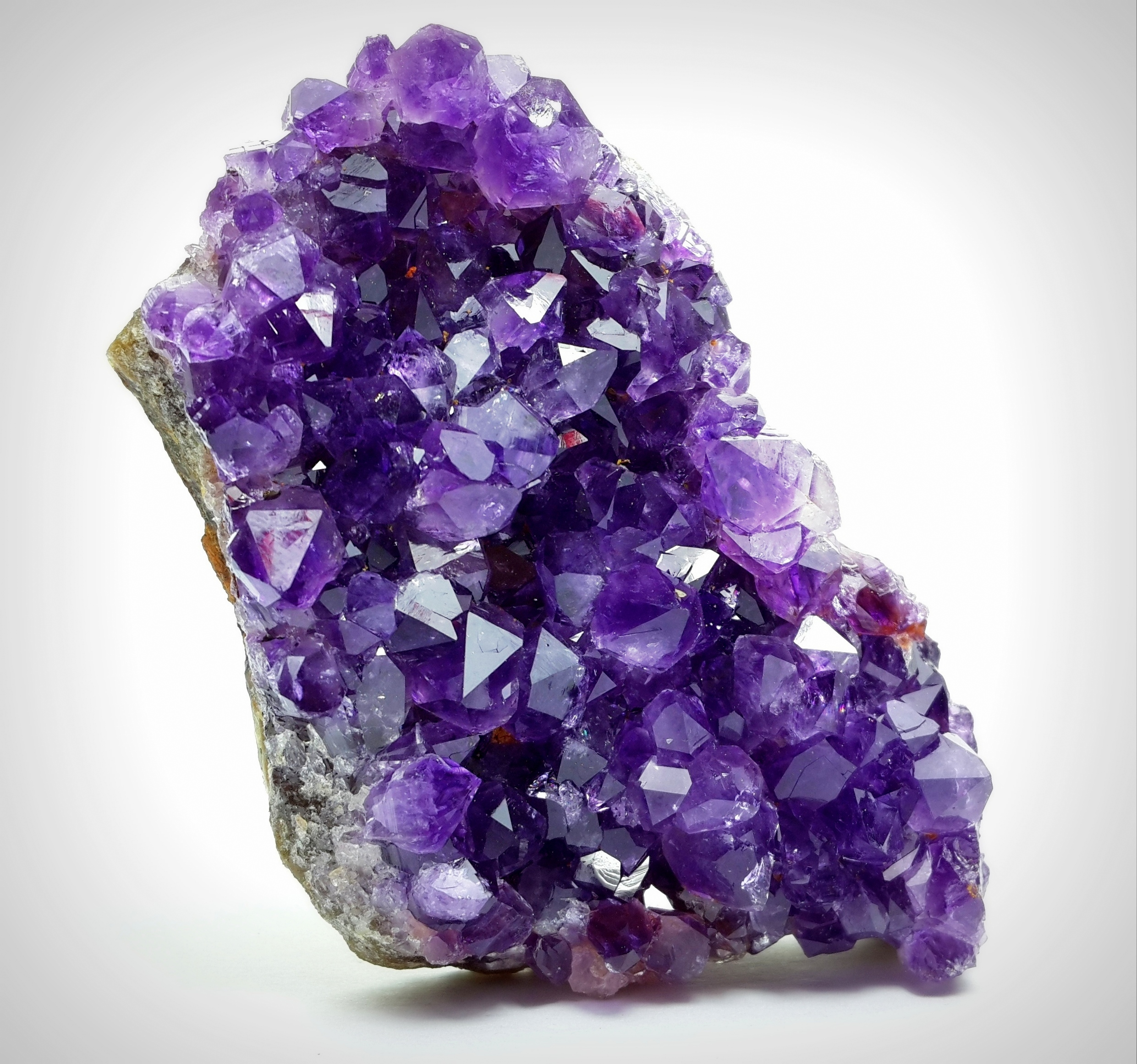 Amatista Laye Extraída de Catalán, Artigas Uruguay